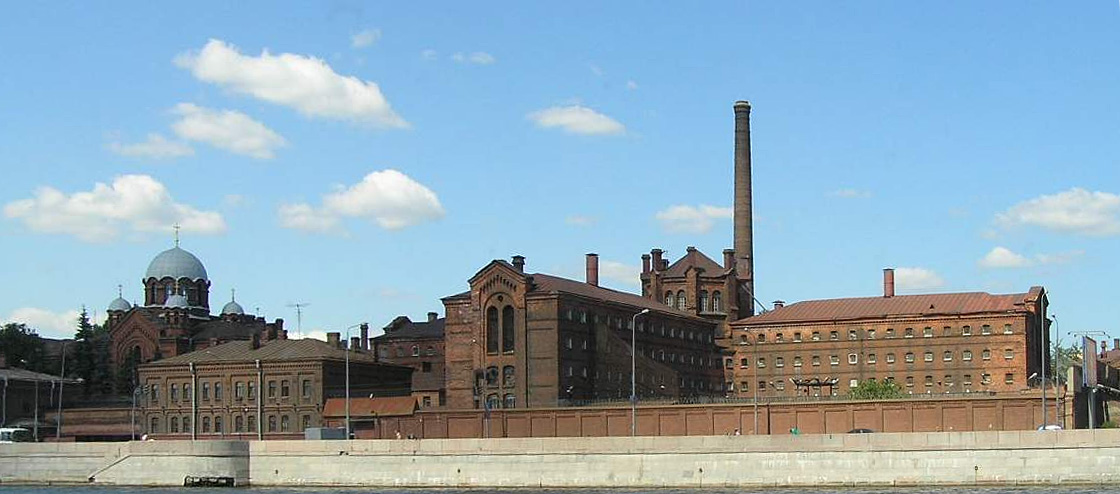 "Kresty", Saint Petersburg prison